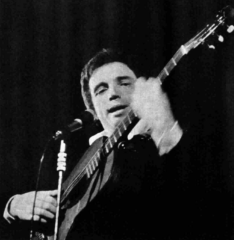 Italian singer Gipo Farassino